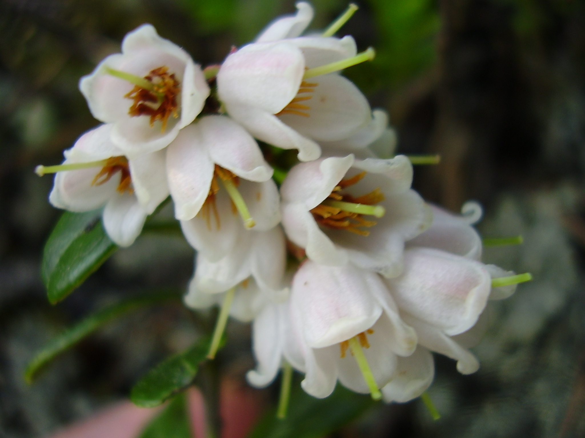 Vaccinium vitis-idaea Photo taken by Käyttäjä:kompak (13th of June 2005)